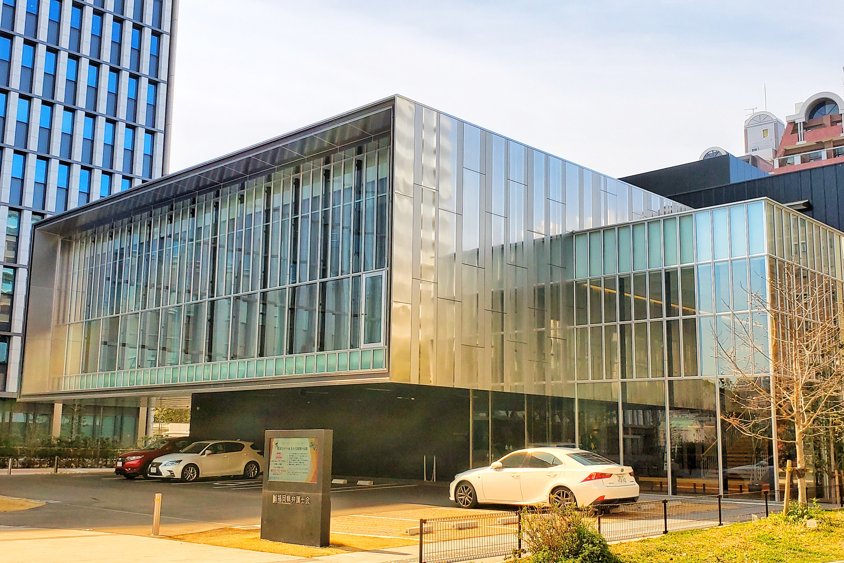 福岡県弁護士会会館